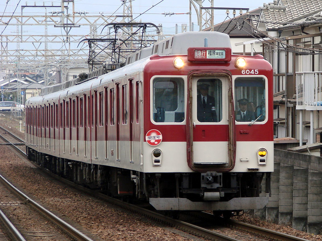 近鉄6020系（開運号）